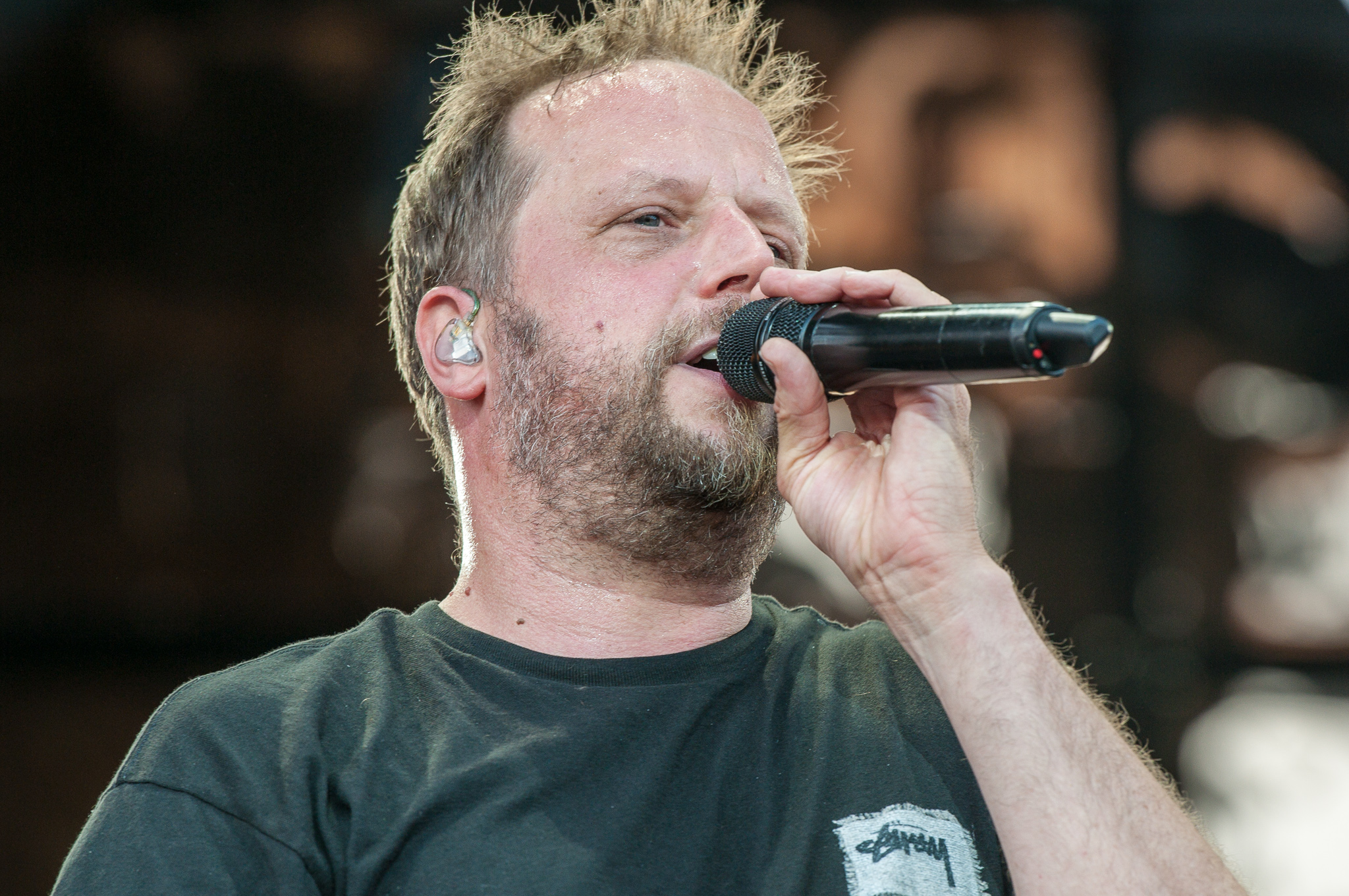 ARGO-Konzerte,Centerstage,Die fantastischen Vier,Fanta4,Konzert,Livekonzert,Livemusik,Michael Bernd Schmidt,Musik,RiP,Rock im Park 2014,Smudo